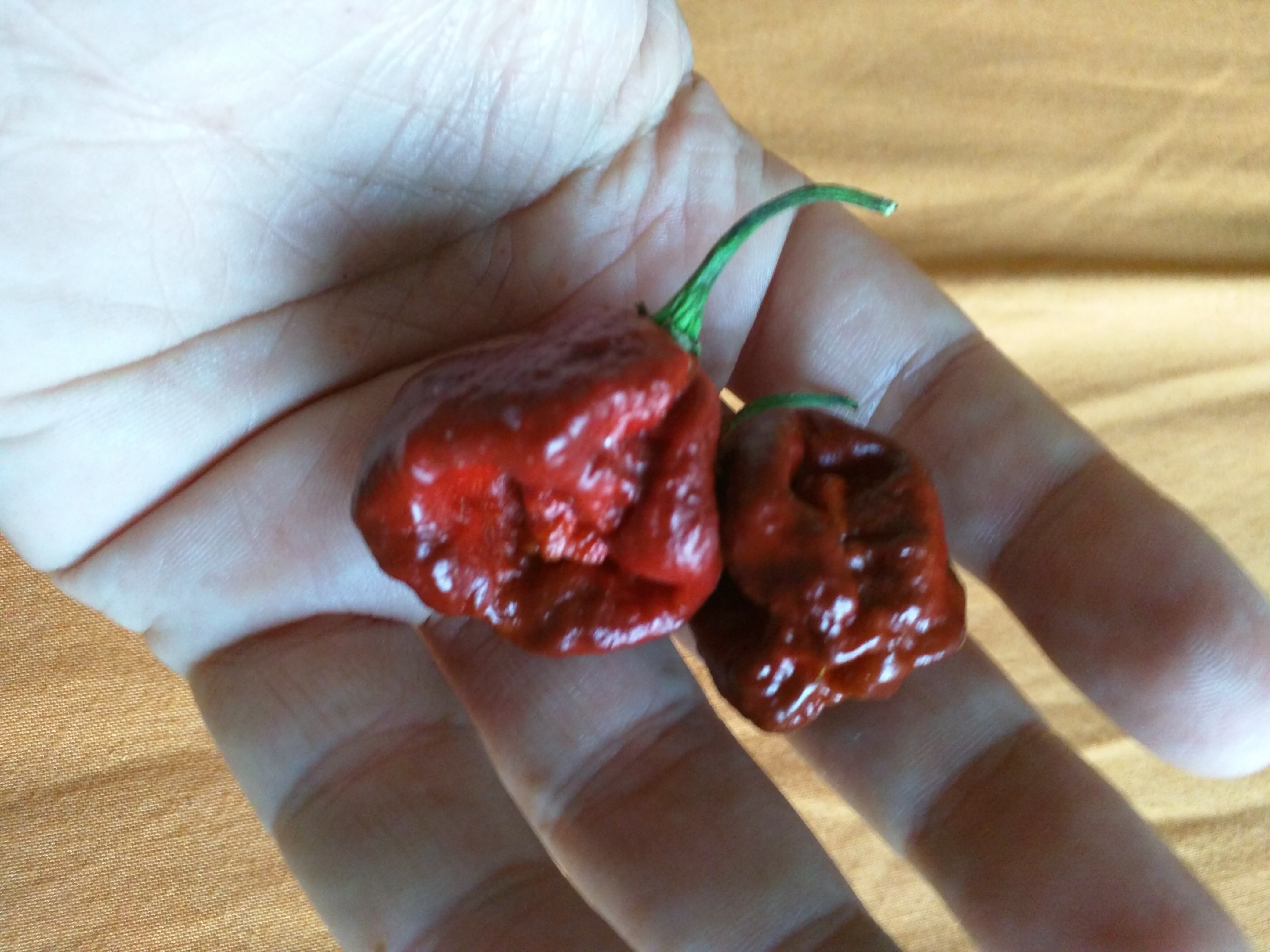 seven pod